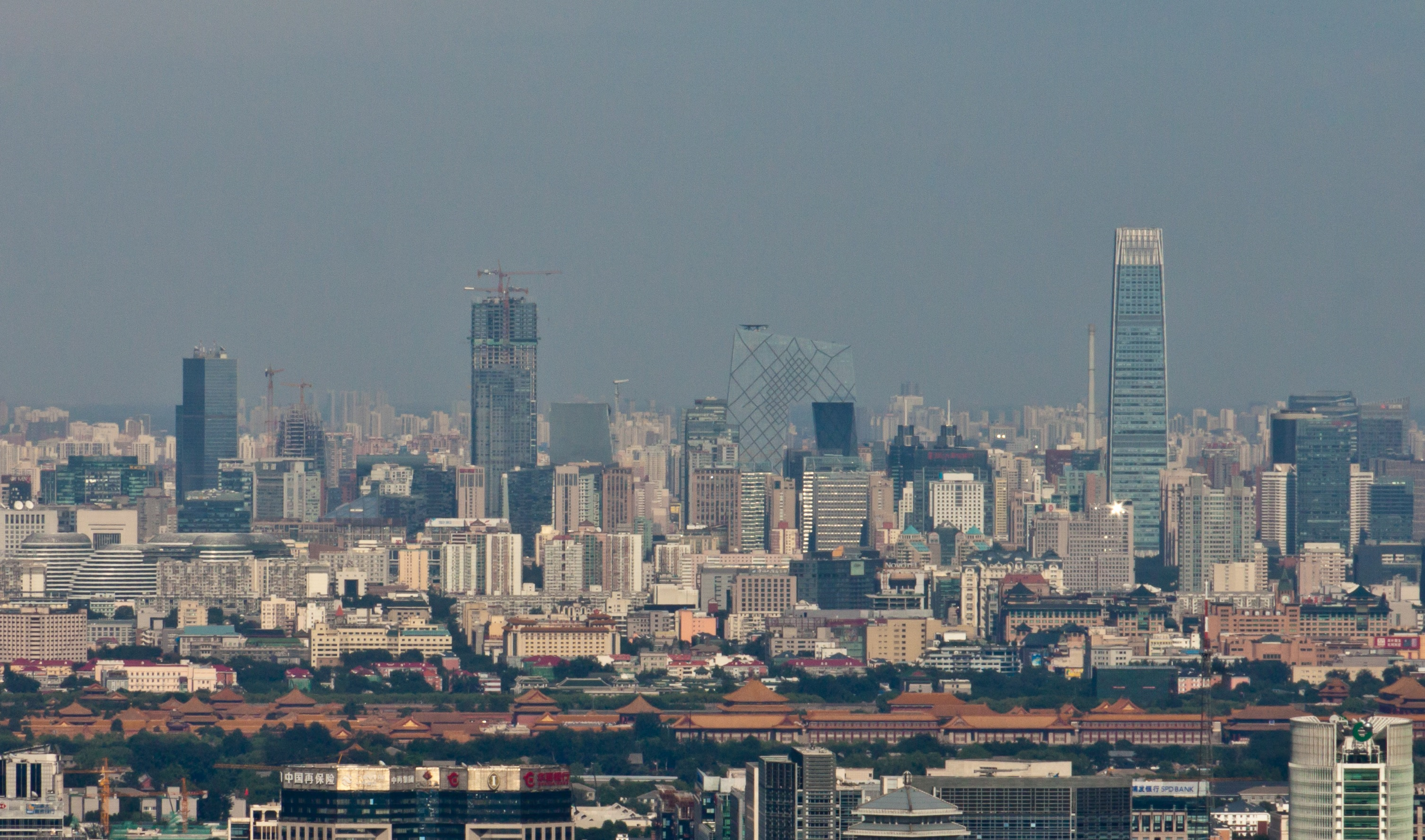 北京市區天際線。